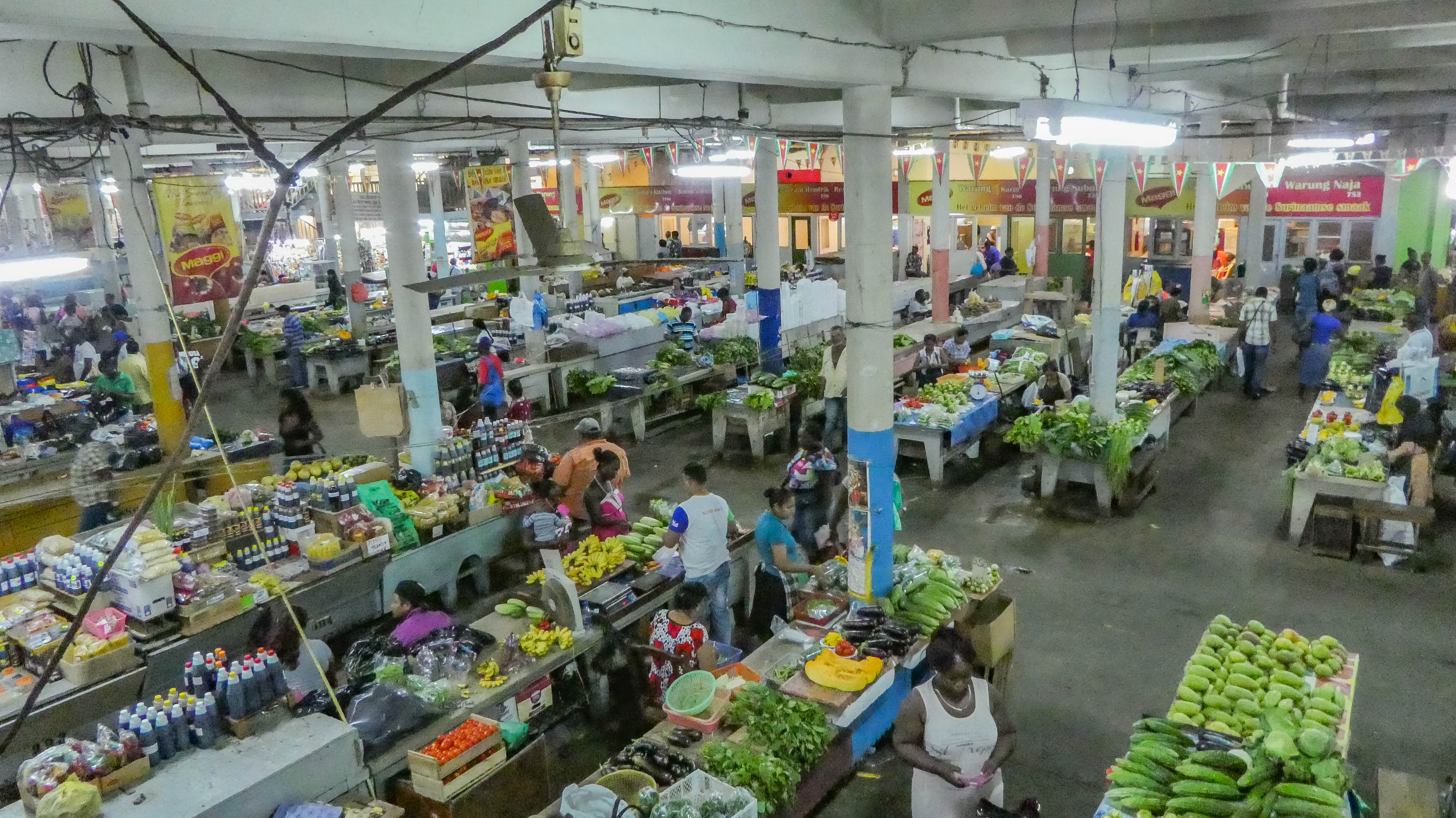 Paramaribo market